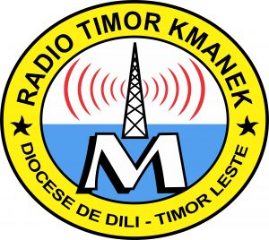 Logo Radio Timor Kmanek